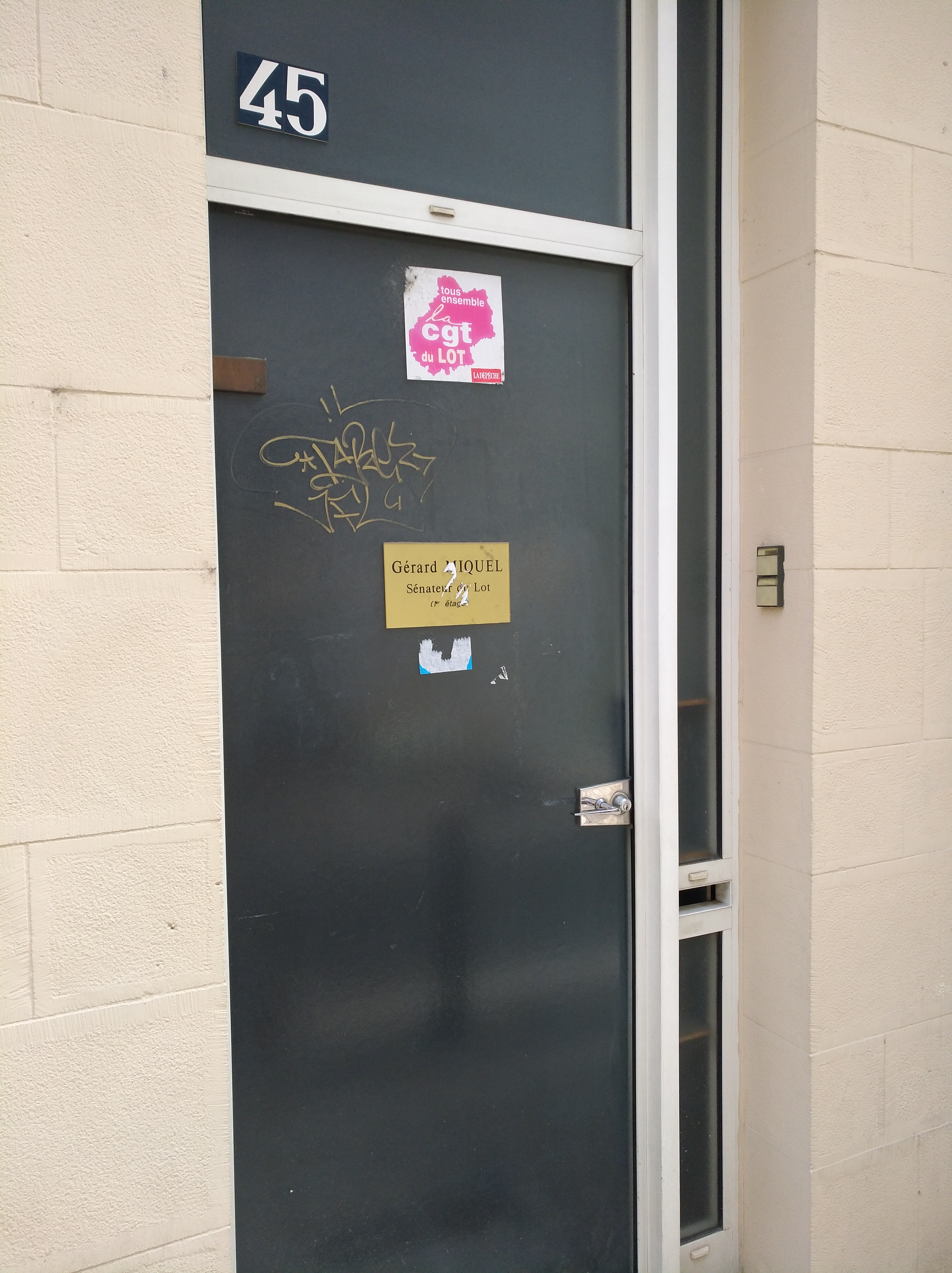 Permanence parlementaire du sénateur Gérard Miquel à Cahors (Lot, France).